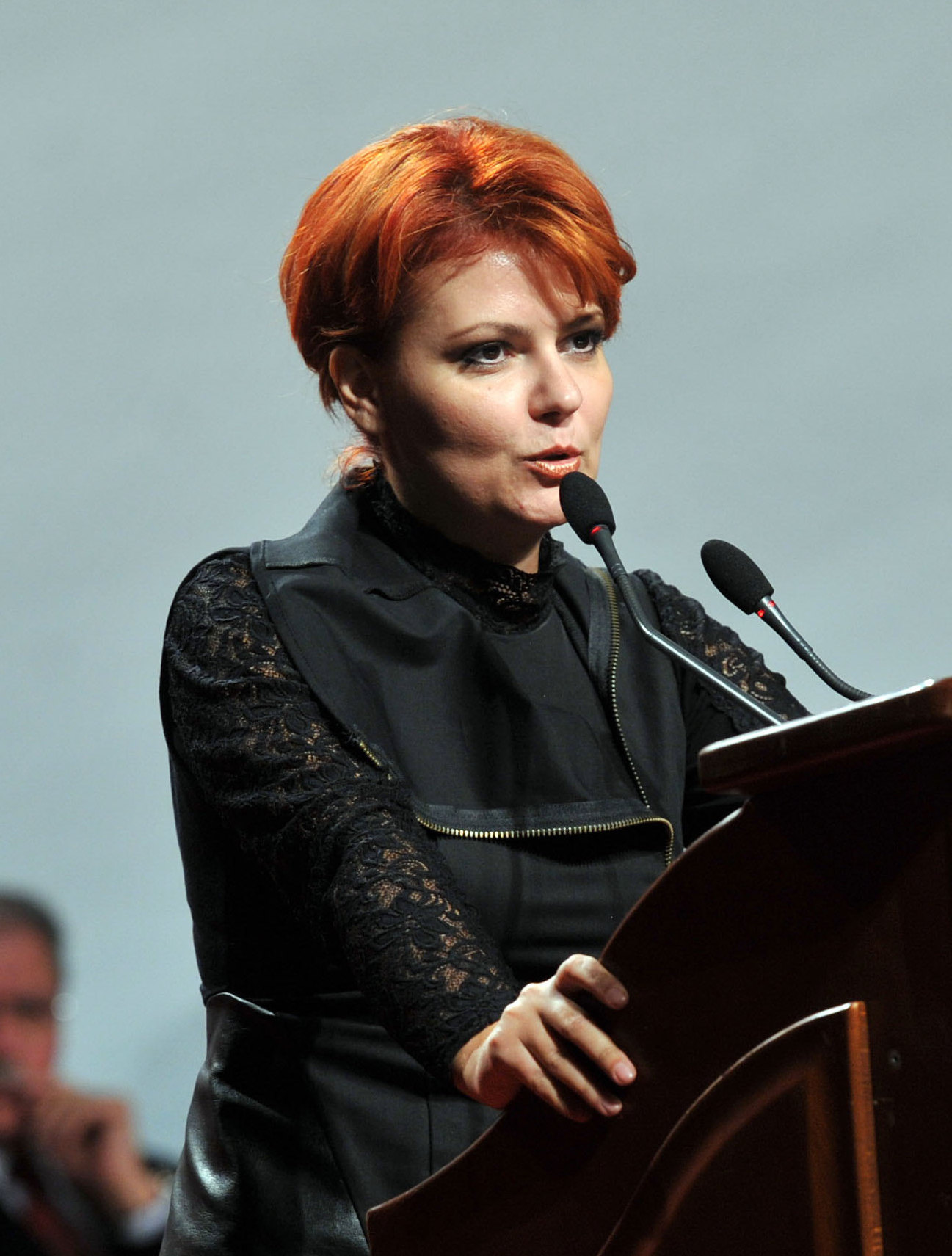 Lia Olguța Vasilescu la Liga Aleșilor Locali ai PSD, Palatul Parlamentului